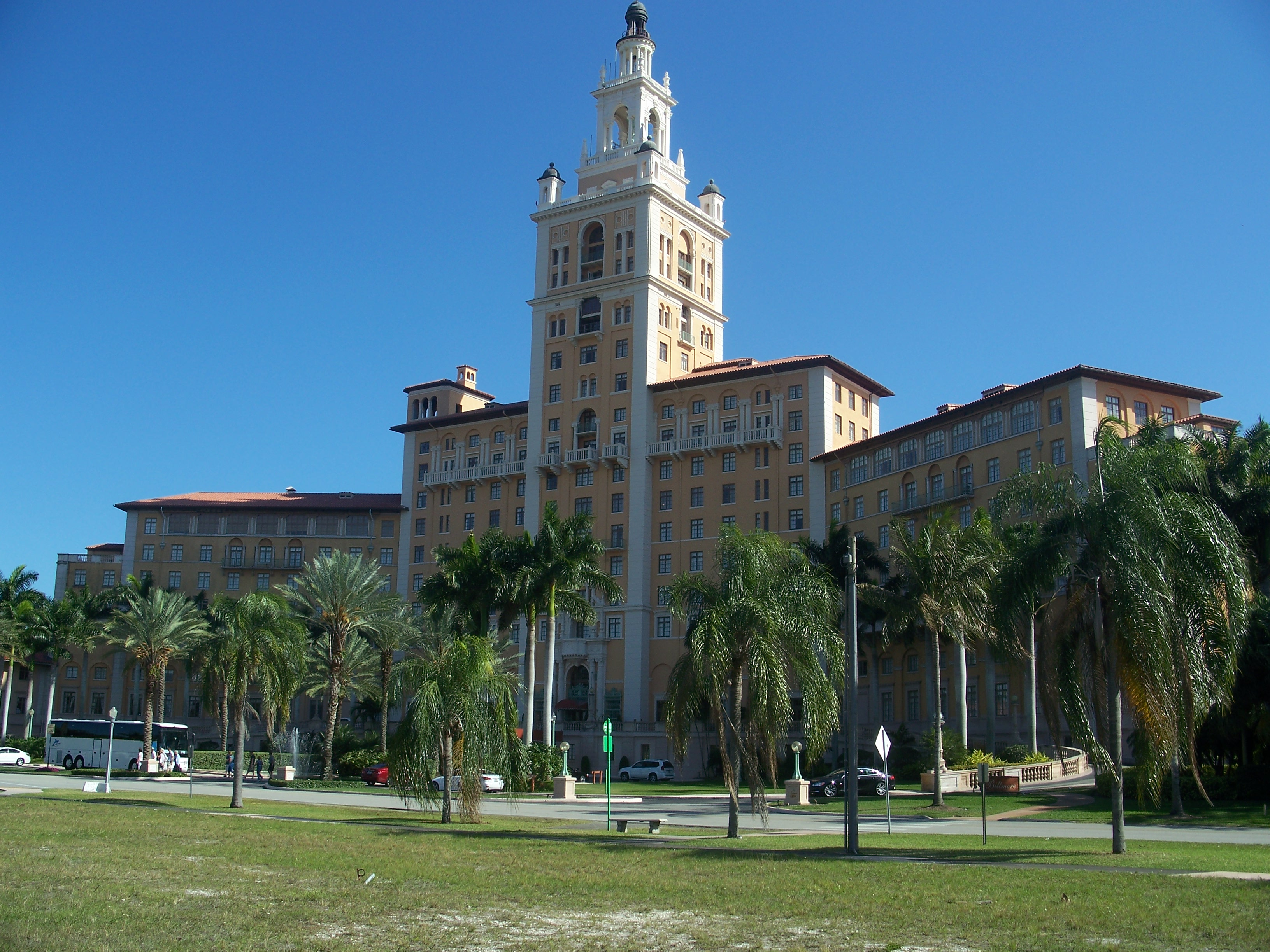 Coral Gables, Florida: Coral Gables Biltmore Hotel